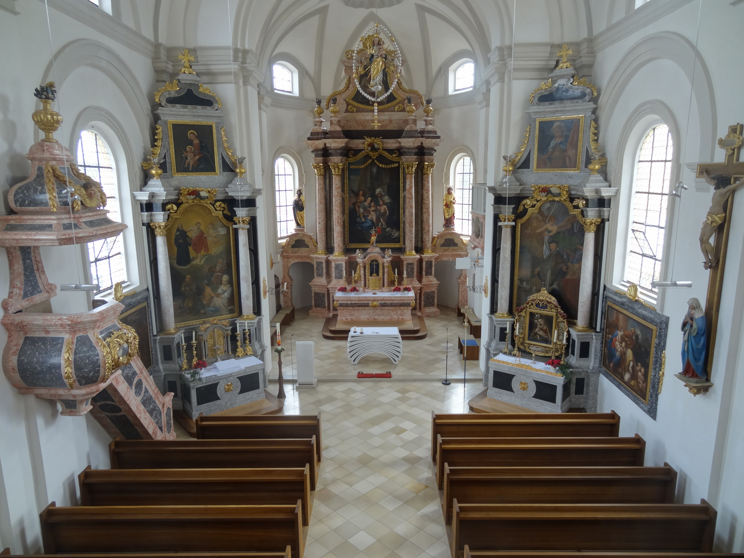 Innenansicht der Pfarrkirche St. Johann Baptist in Eching (Lkr. Landshut), aufgenommen von der Westempore